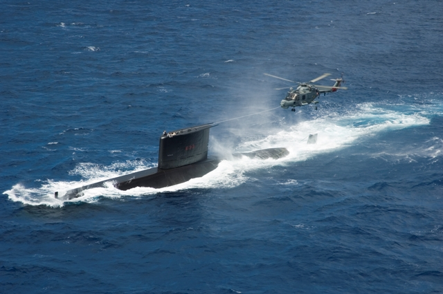 Arquivo liberado pela Marinha do Brasil através de projeto GLAM com Wiki Educação Brasil